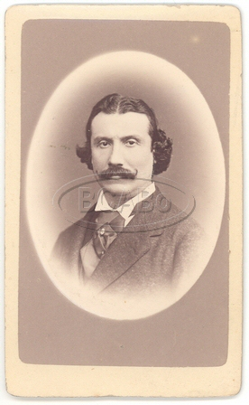 Alessandro Monti